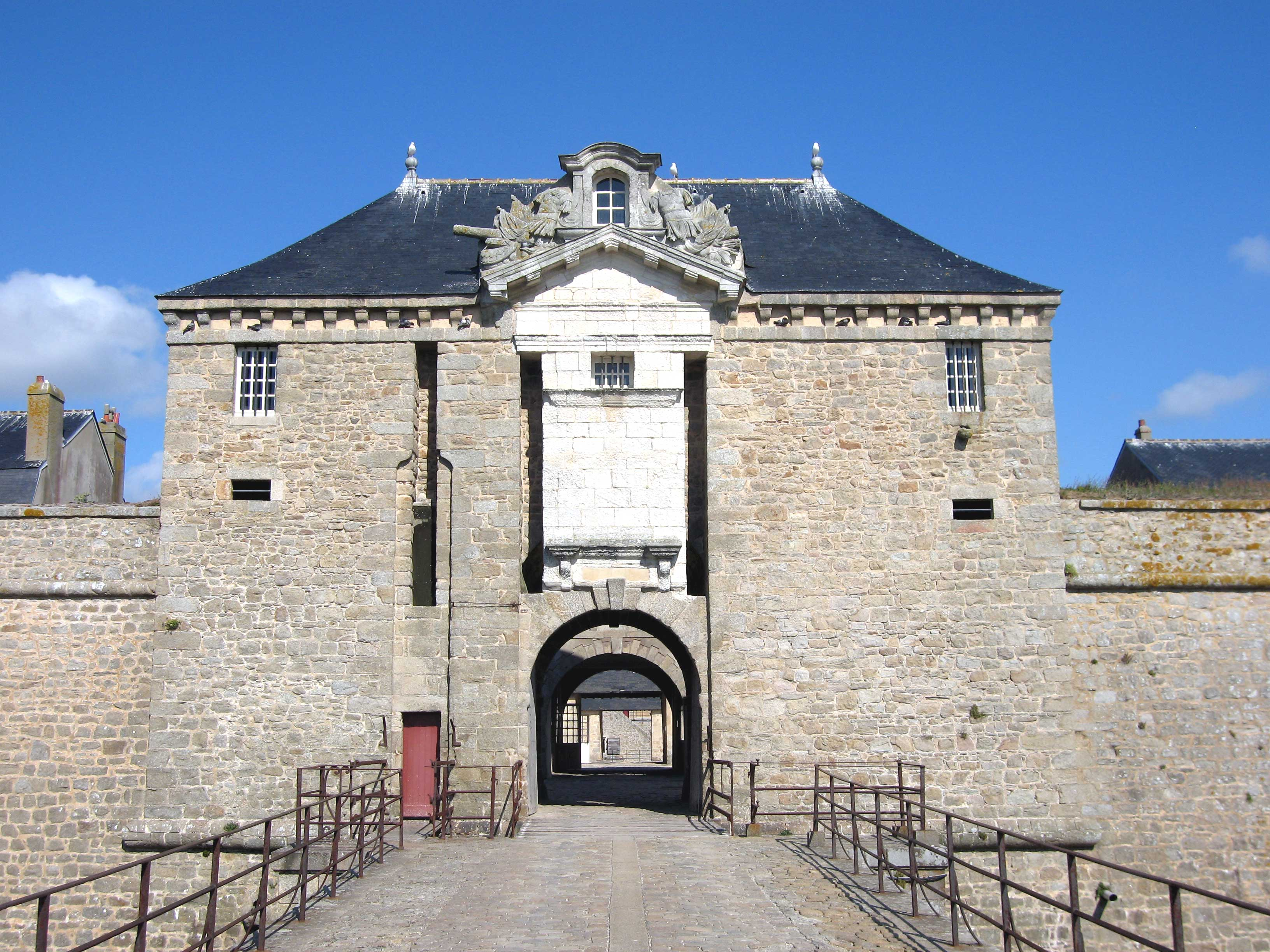 Description : Entrée de la citadelle de Port-Louis Place : Port Louis, Bretagne, France Date : 2006 Auteur : Pline